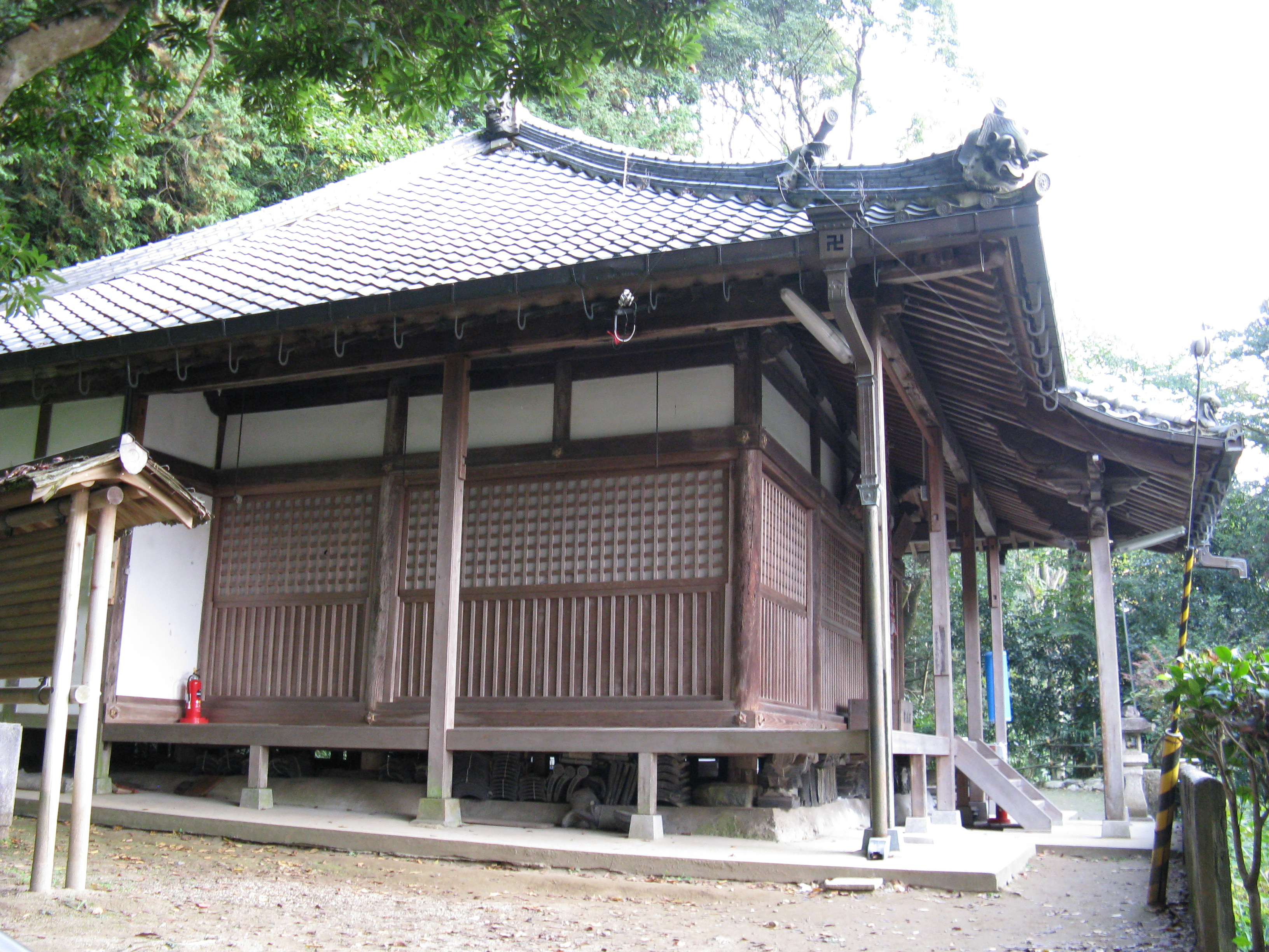 薬師寺 本堂